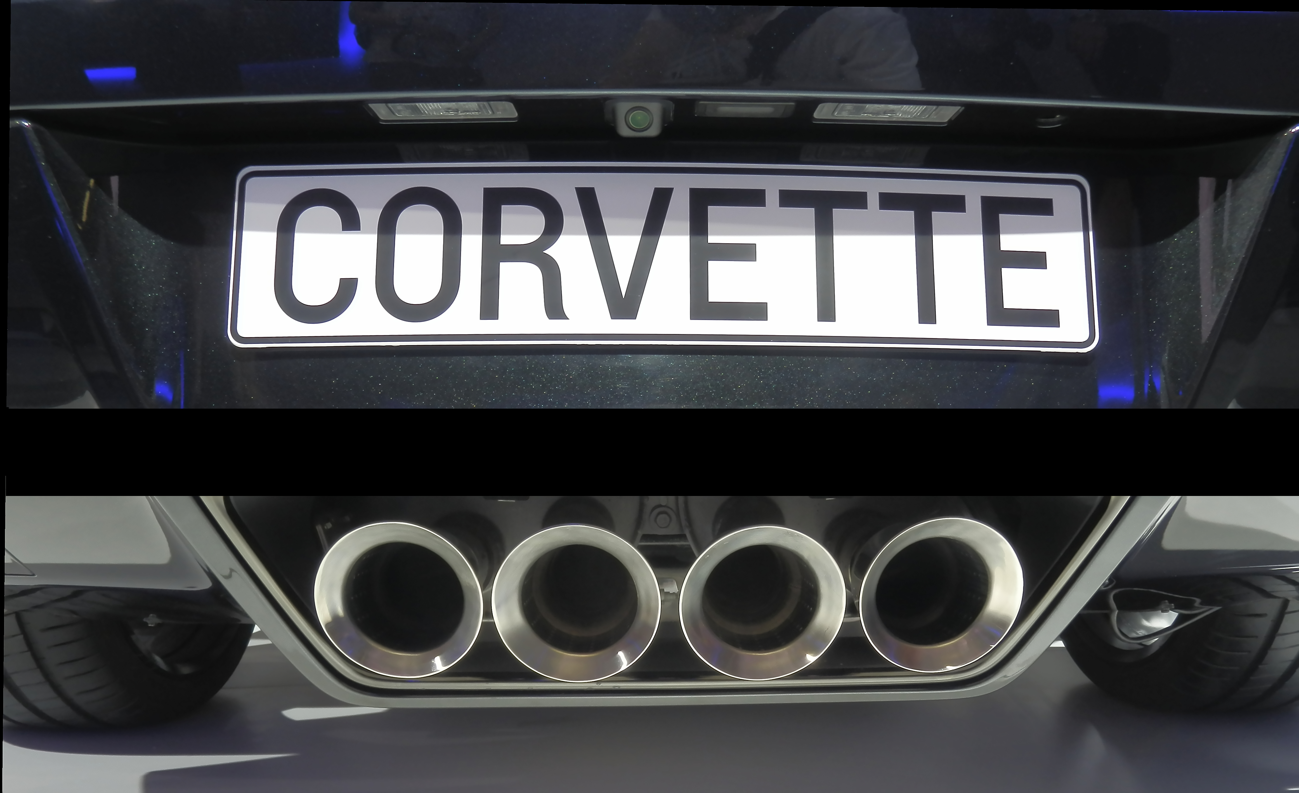 Chevrolet Corvette C7 Exhaust Pipes at IAA 2013